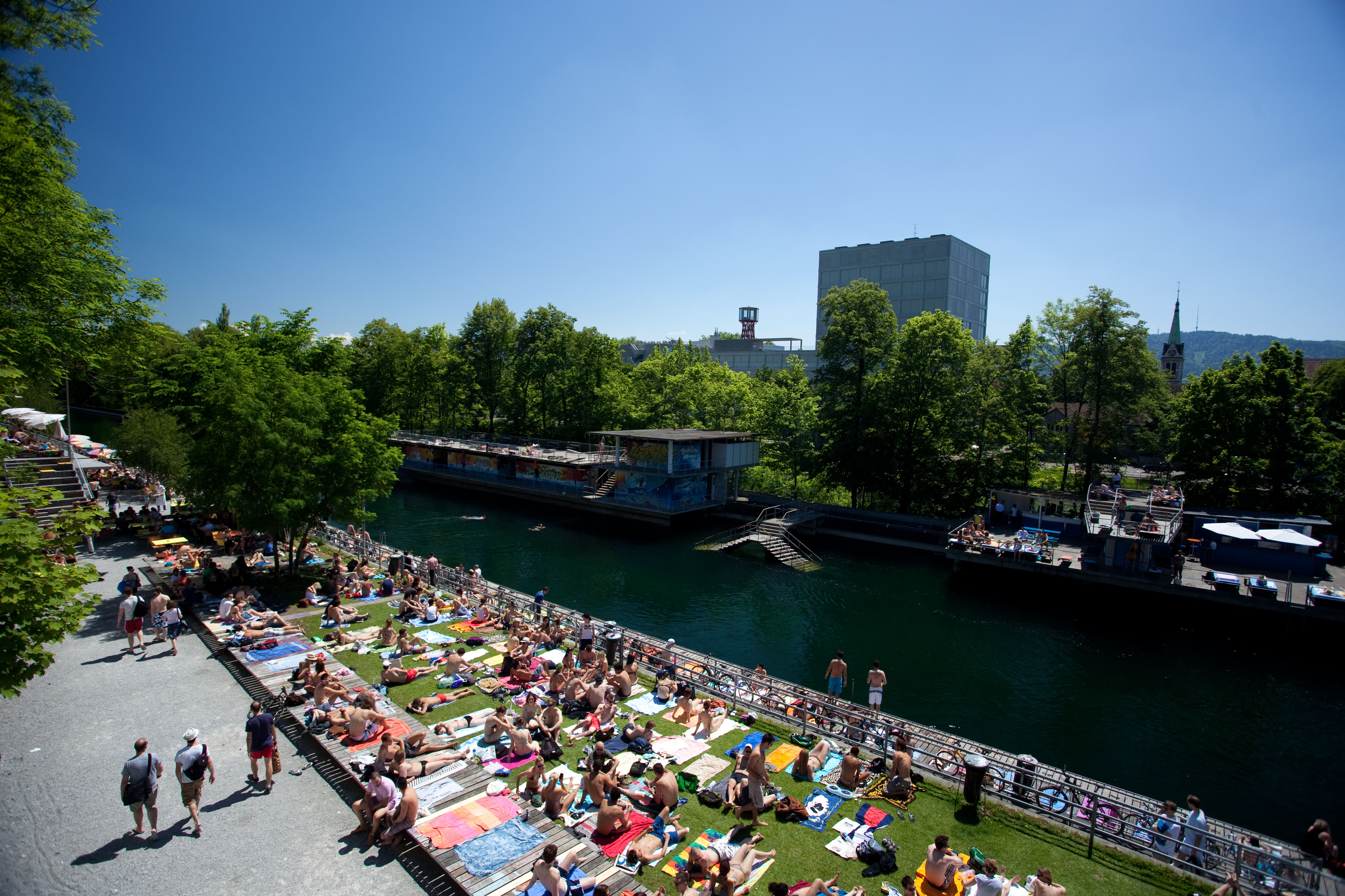 Badi Oberer Letten, Zürich, im Sommer 2010